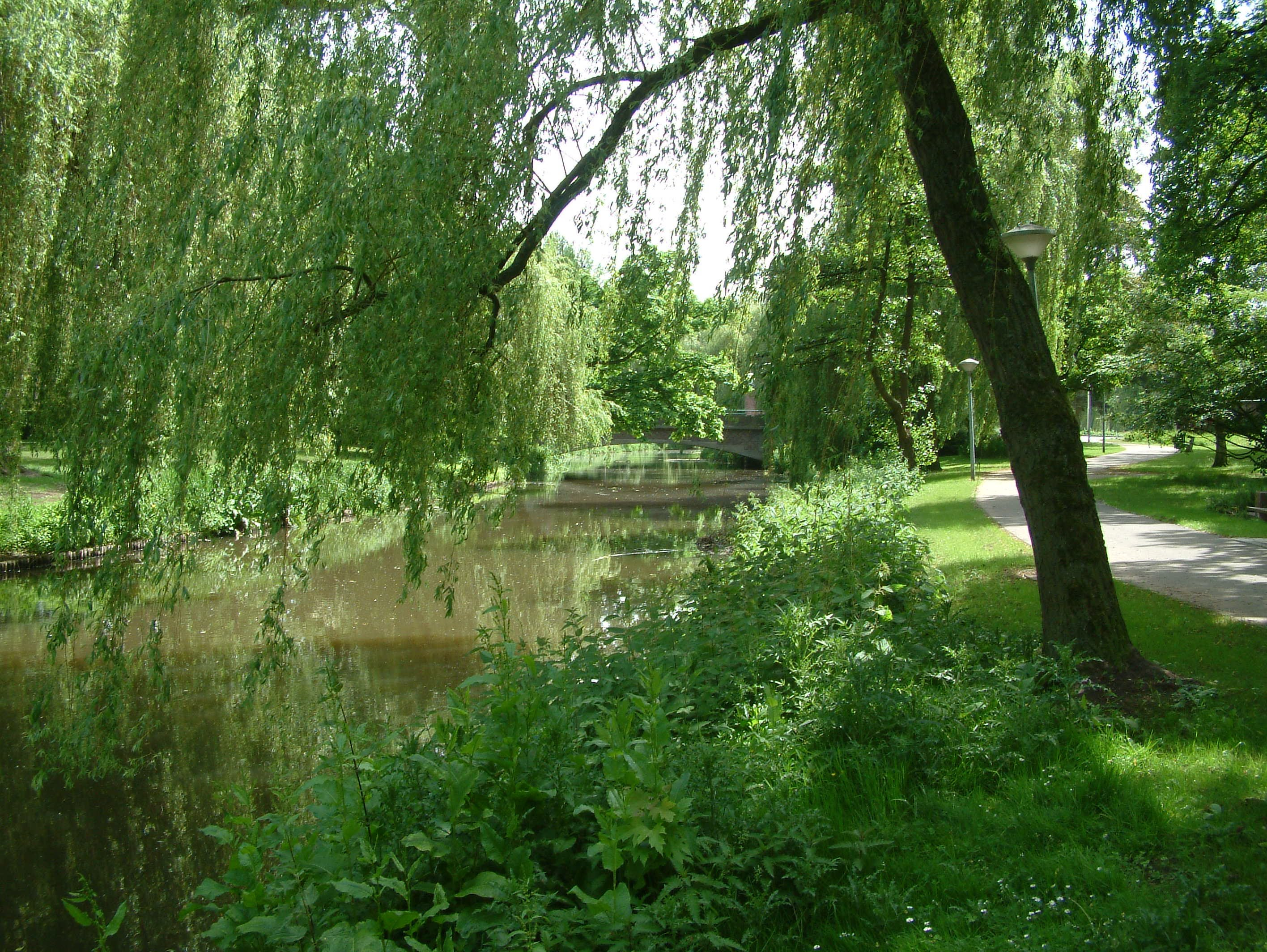 Rivier de Dommel in Eindhoven (NL), gefotografeerd in het Anne Frankplantsoen.